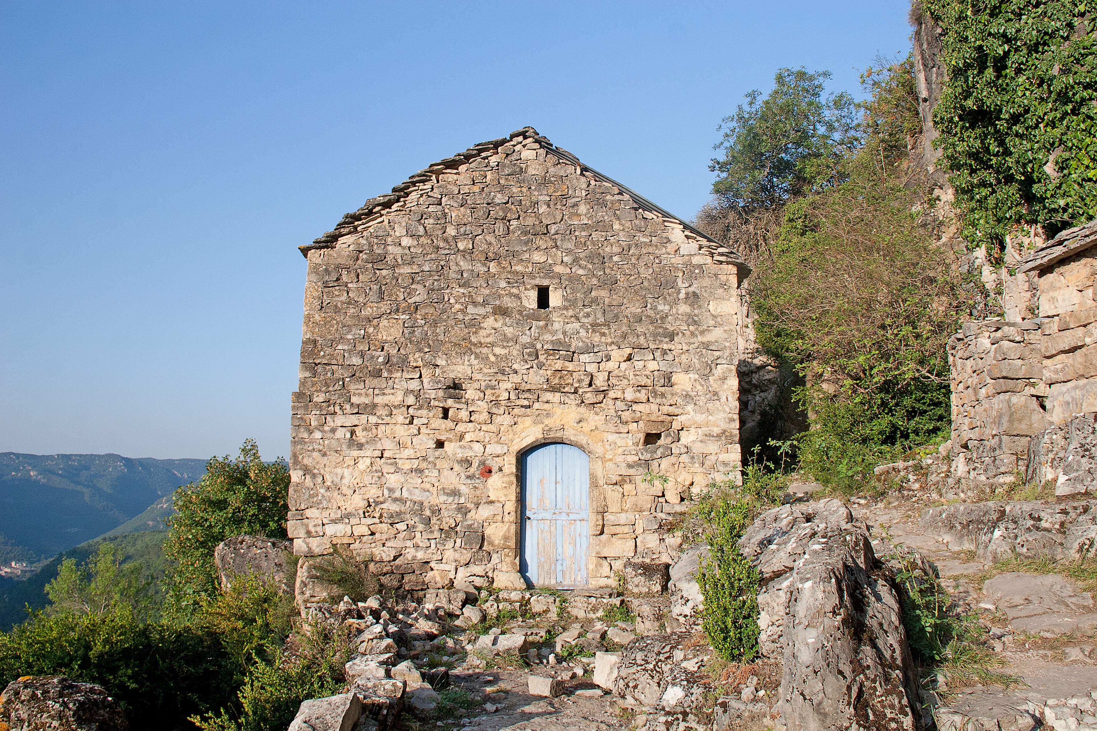 Églazines